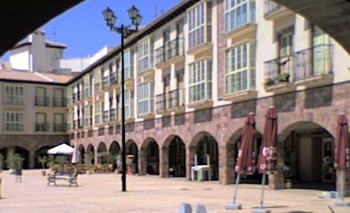 Plaza Mayor de Huércal-Overa (Almería, España)